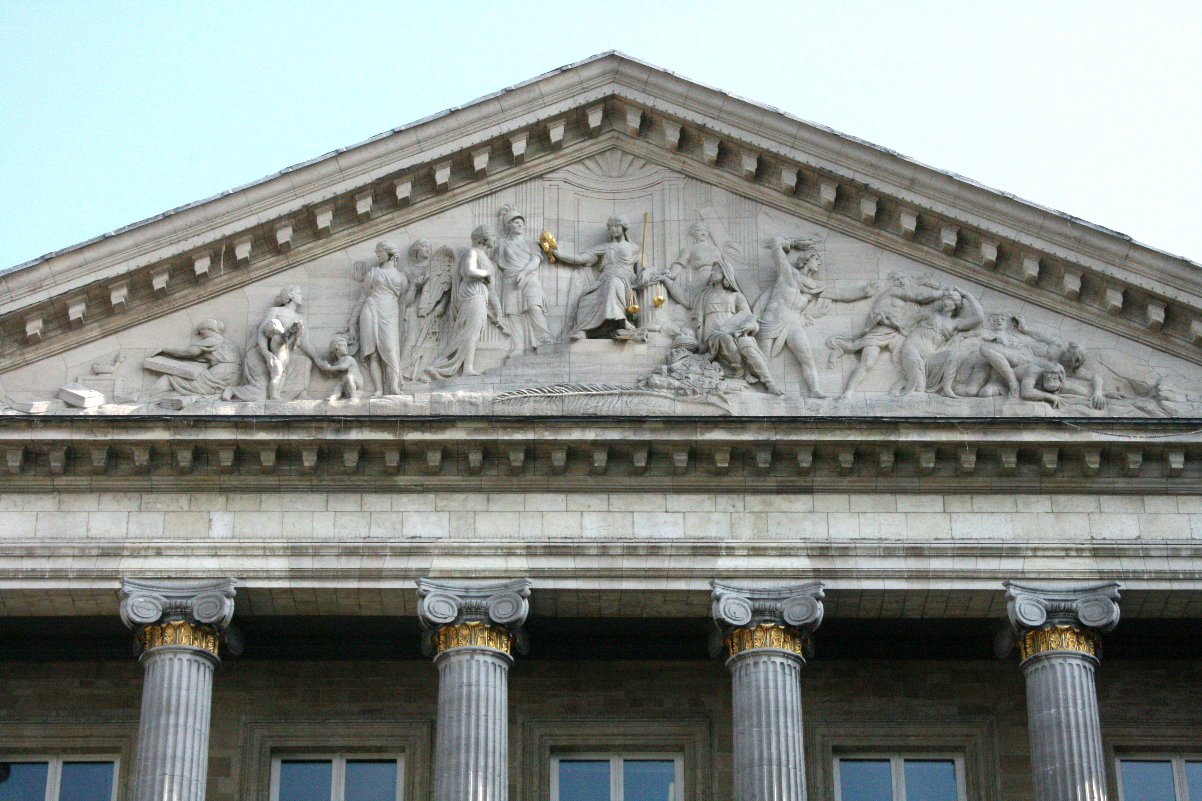 Fronton du Palais de la Nation (1781), oeuvre de Gilles-Lambert Godecharle. Rue de la Loi, Bruxelles (Belgique)